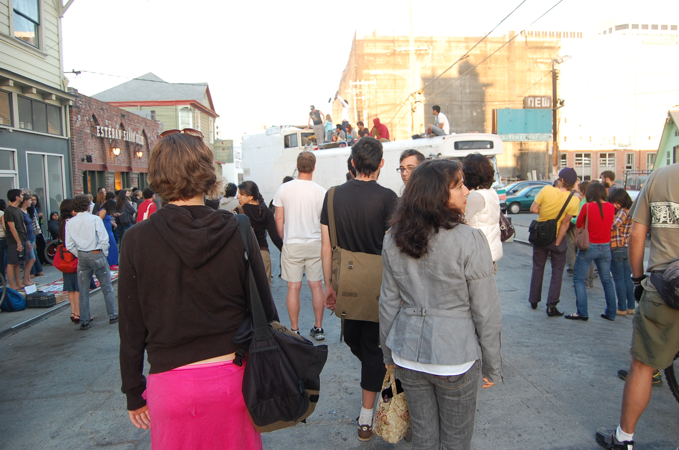 Street scene at Art Murmur in 2007.